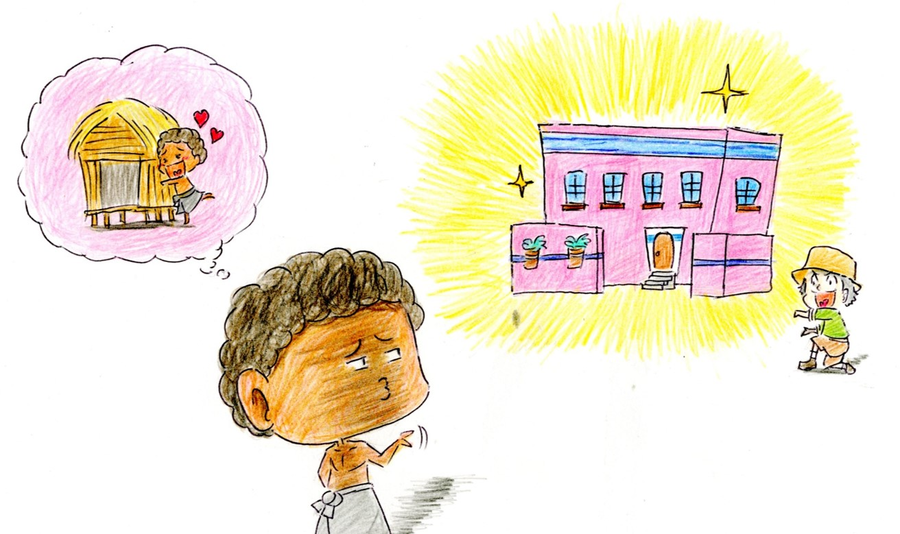 如今的多數塞芒人仍不習慣現代化生活，而選擇繼續留在雨林裡生活